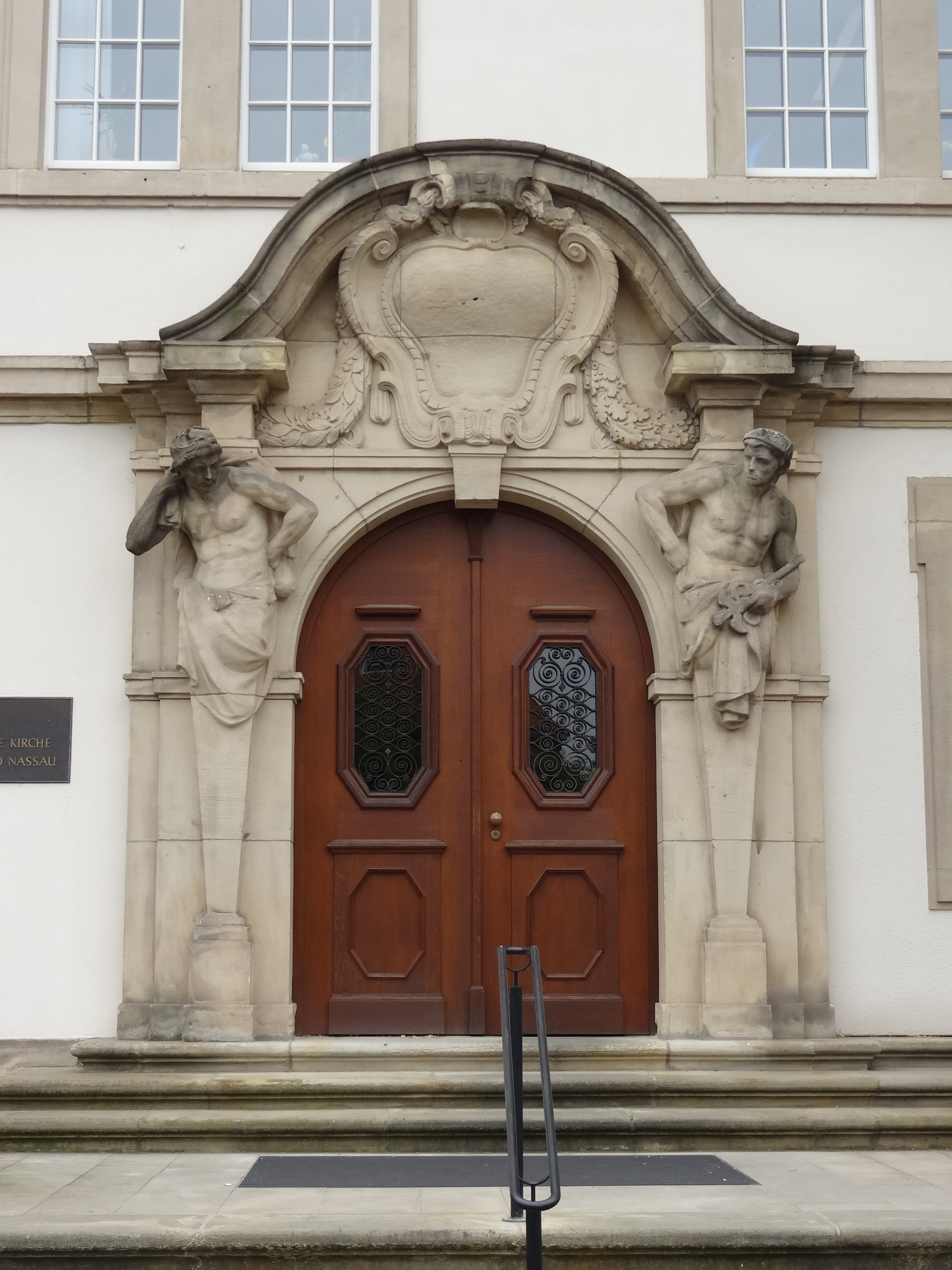 Paulusplatz 1 (Darmstadt)